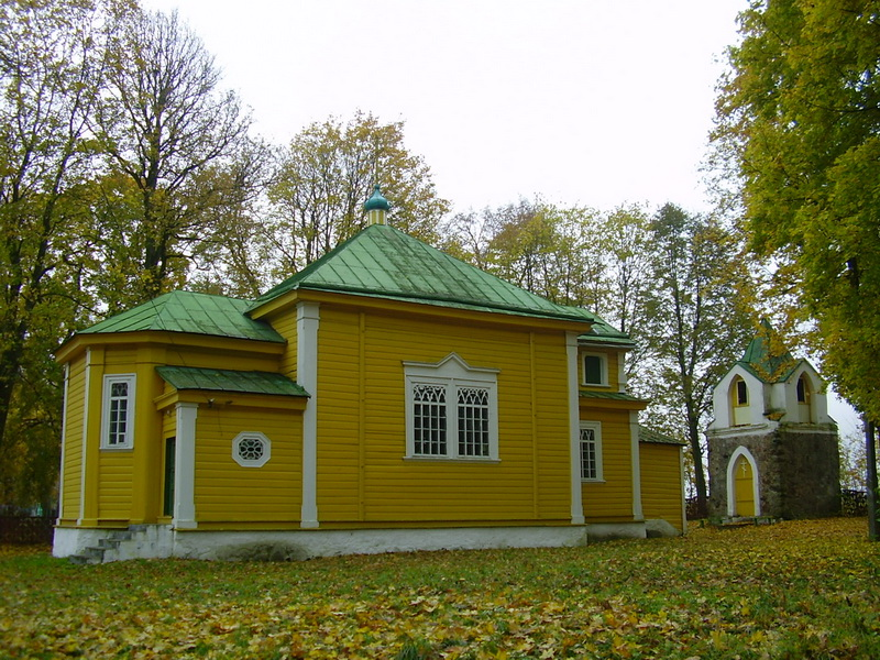 Дзяляцічы. Краявіды